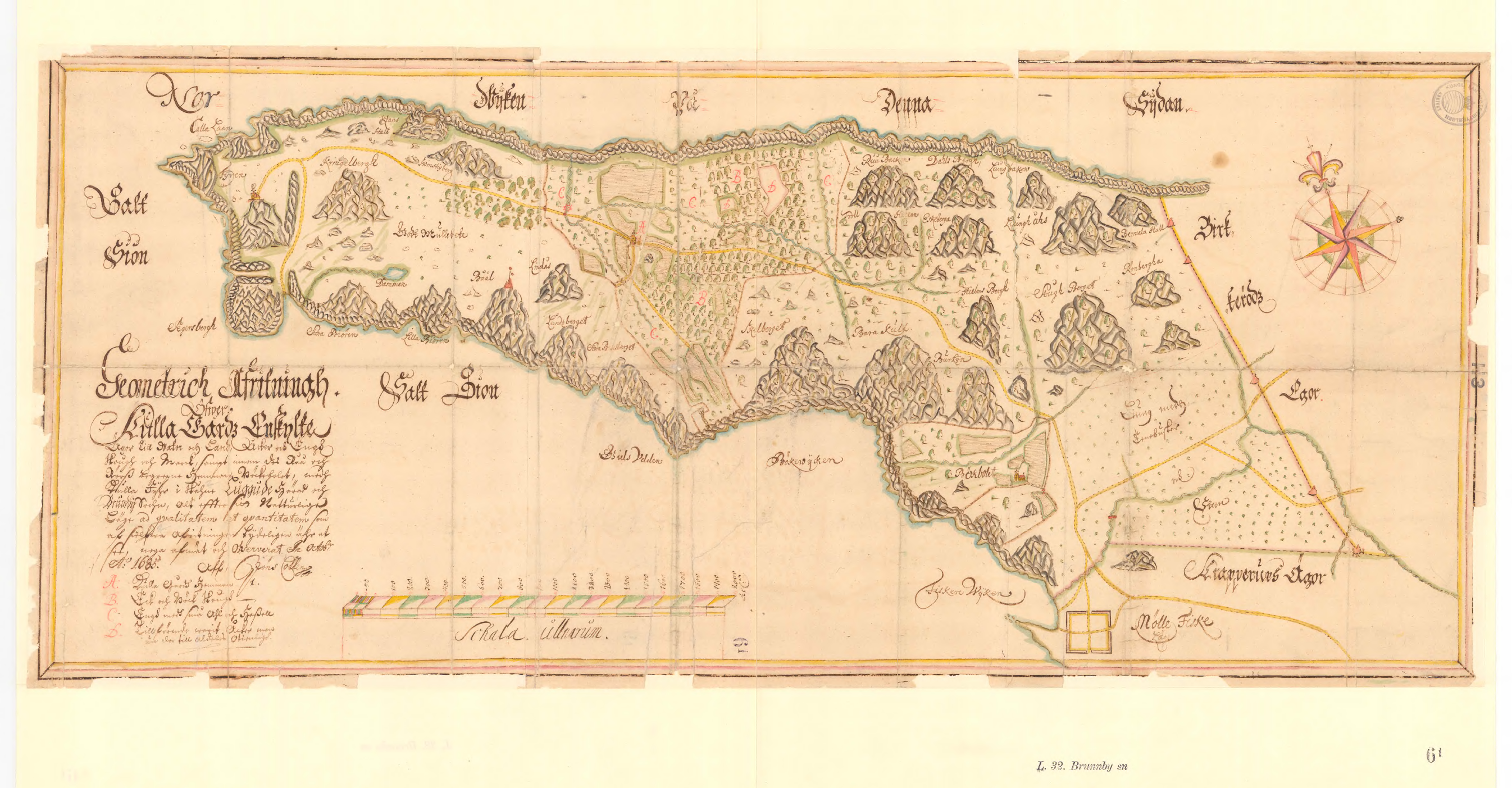 Karta över Kullaberg från 1685. Hämtad från Lantmäteriets tjänst Historiska kartor. L32-6:1 Malmöhus län Brunnby socken Bökebolet nr 1 Geometrisk avmätning 1685 Anton ciöpinger, jöns collén